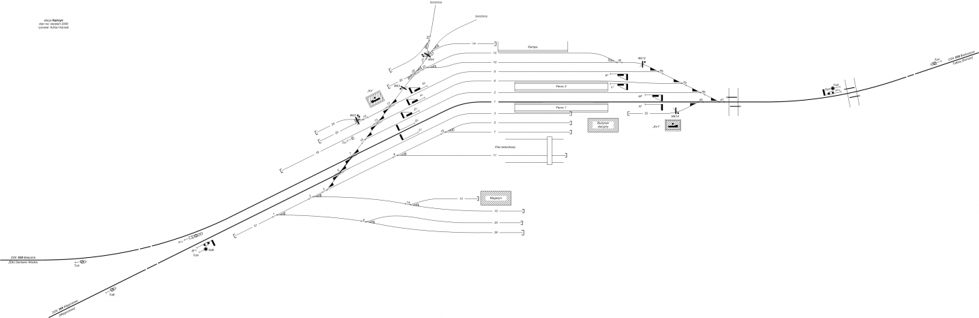 Bahnhofsplan_Ketrzyn